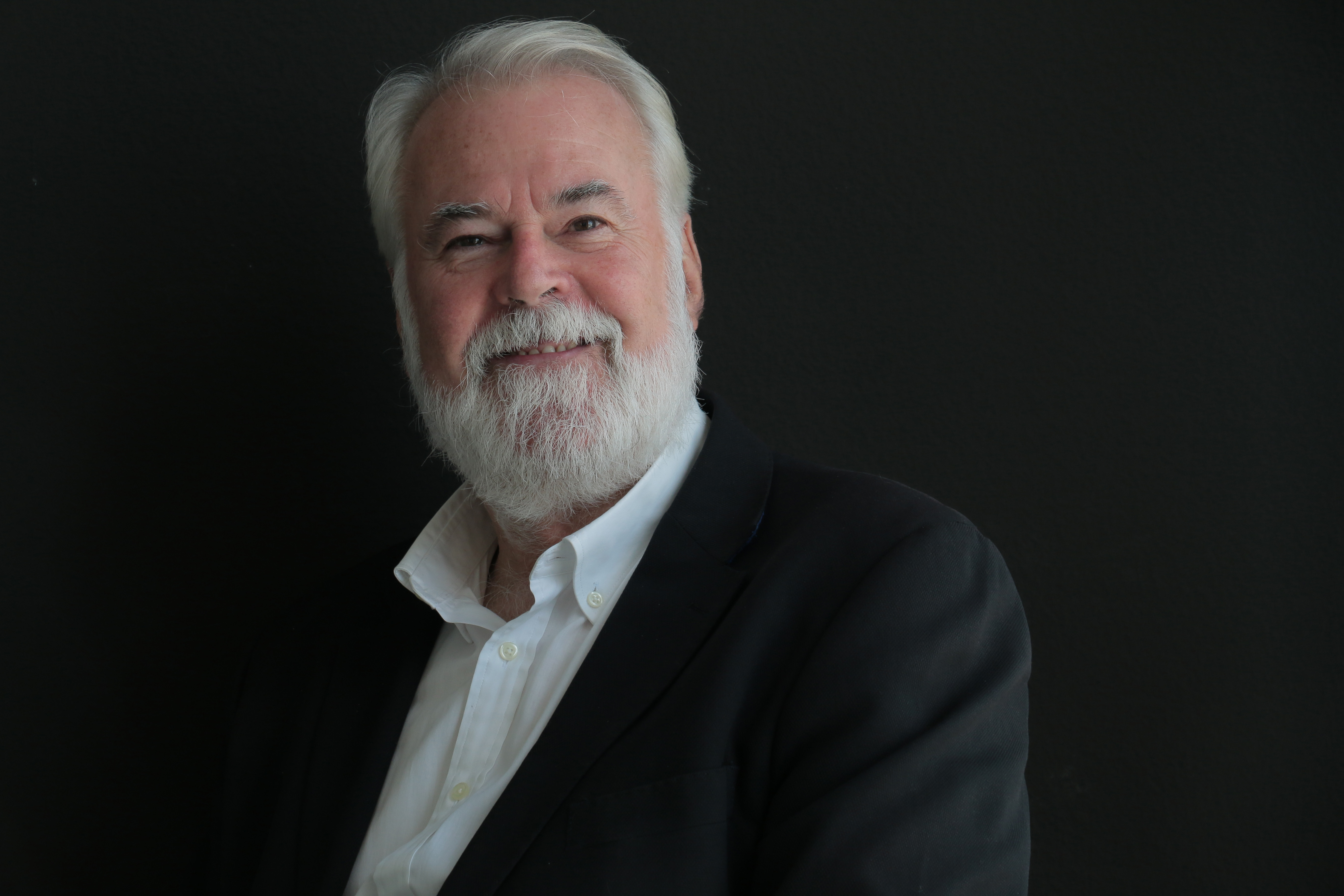 Antonio Moral